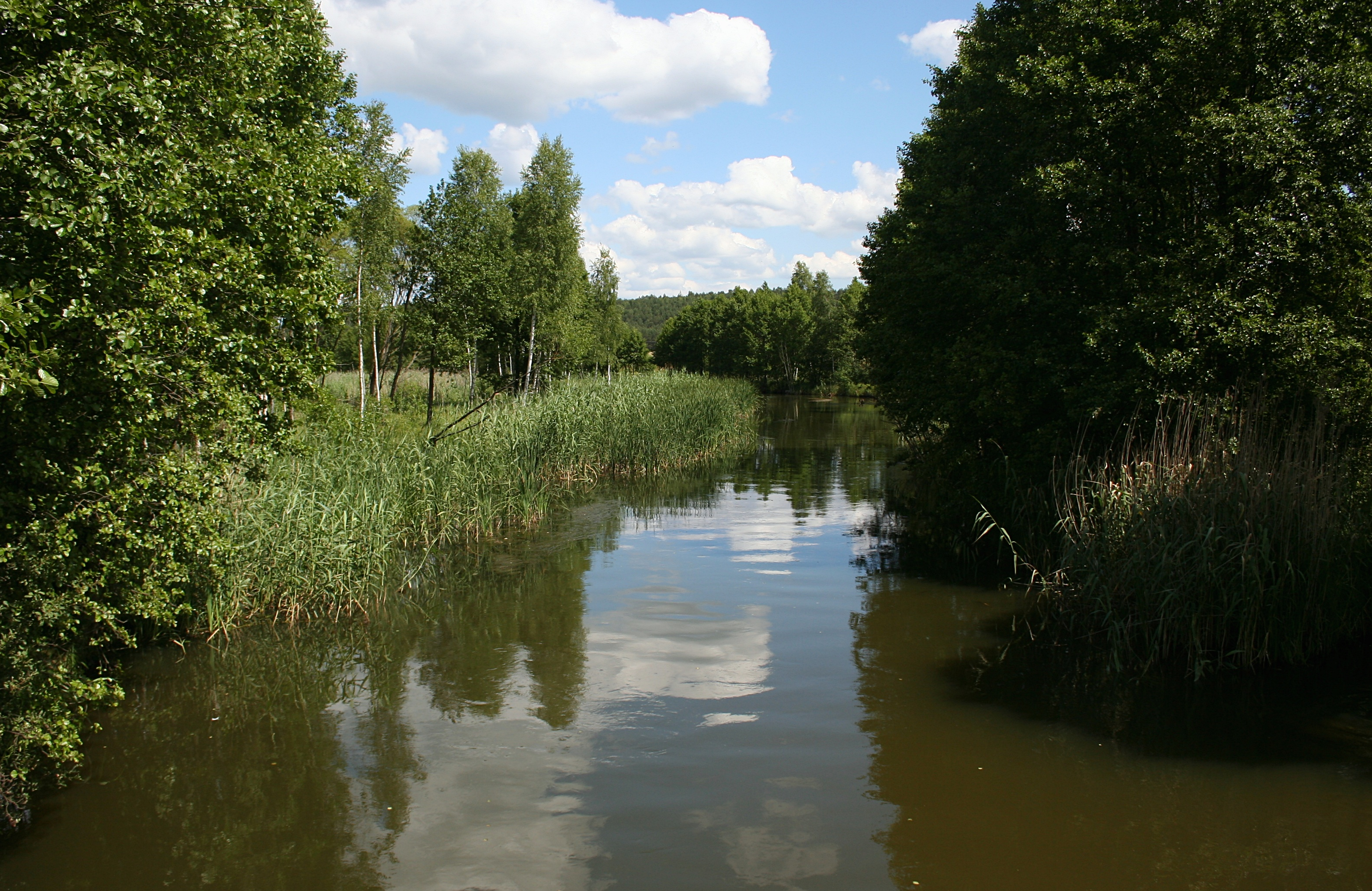 Zaborski Park Krajobrazowy, Zbrzyca w okolicach ujścia do Jeziora Witoczno